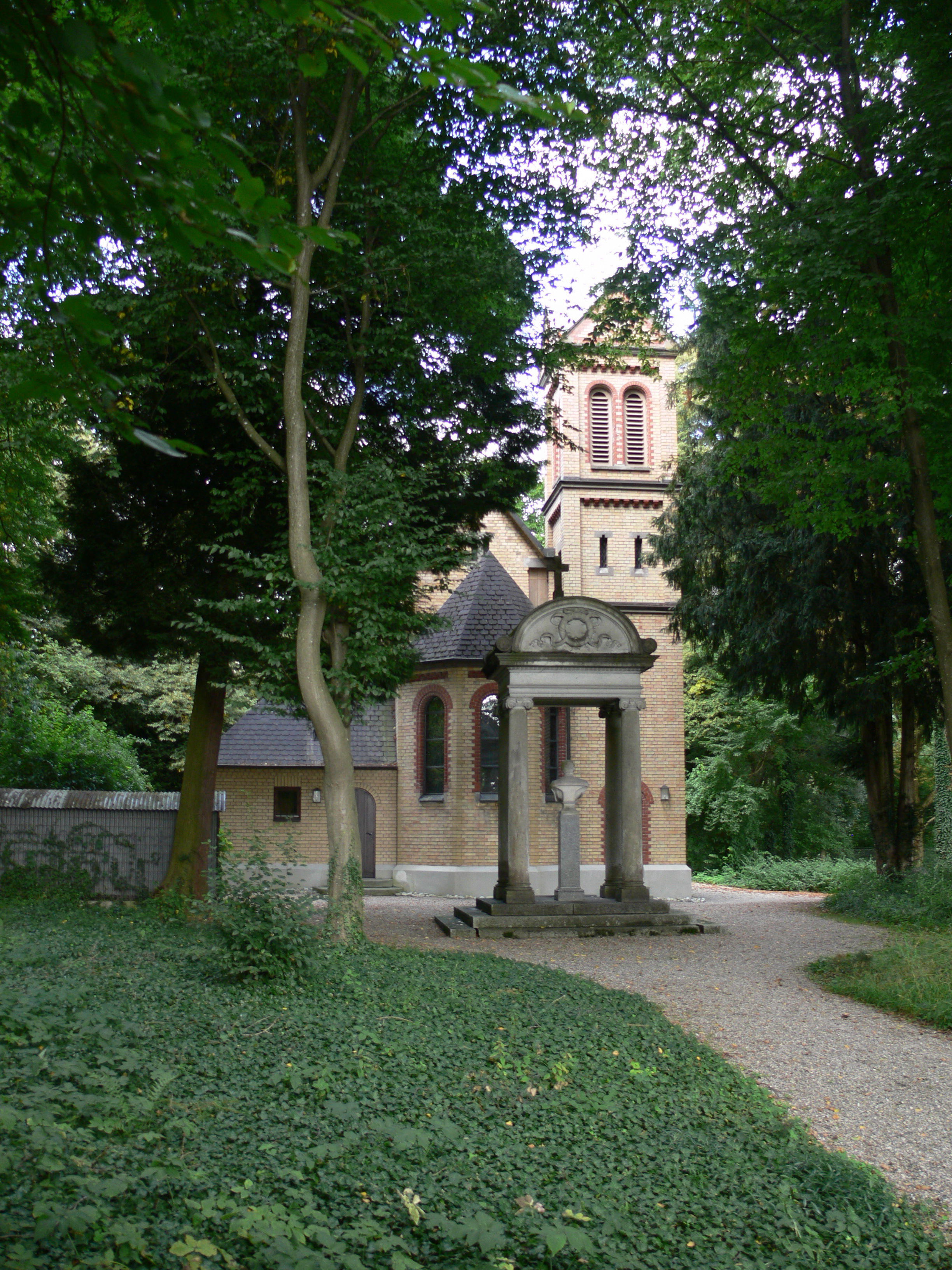 Evangelische Kirche in Mochenwangen, Gemeinde Wolpertswende, Landkreis Ravensburg